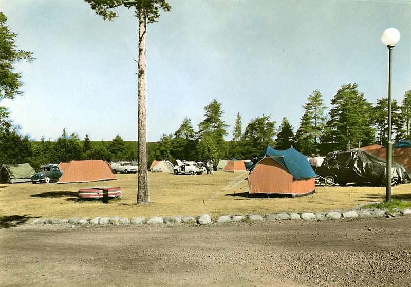 Campingplats Sandbacka. Handkolorerad variant av ac01163.; Byggnadsverk; Campingplats; Rekreation och turism